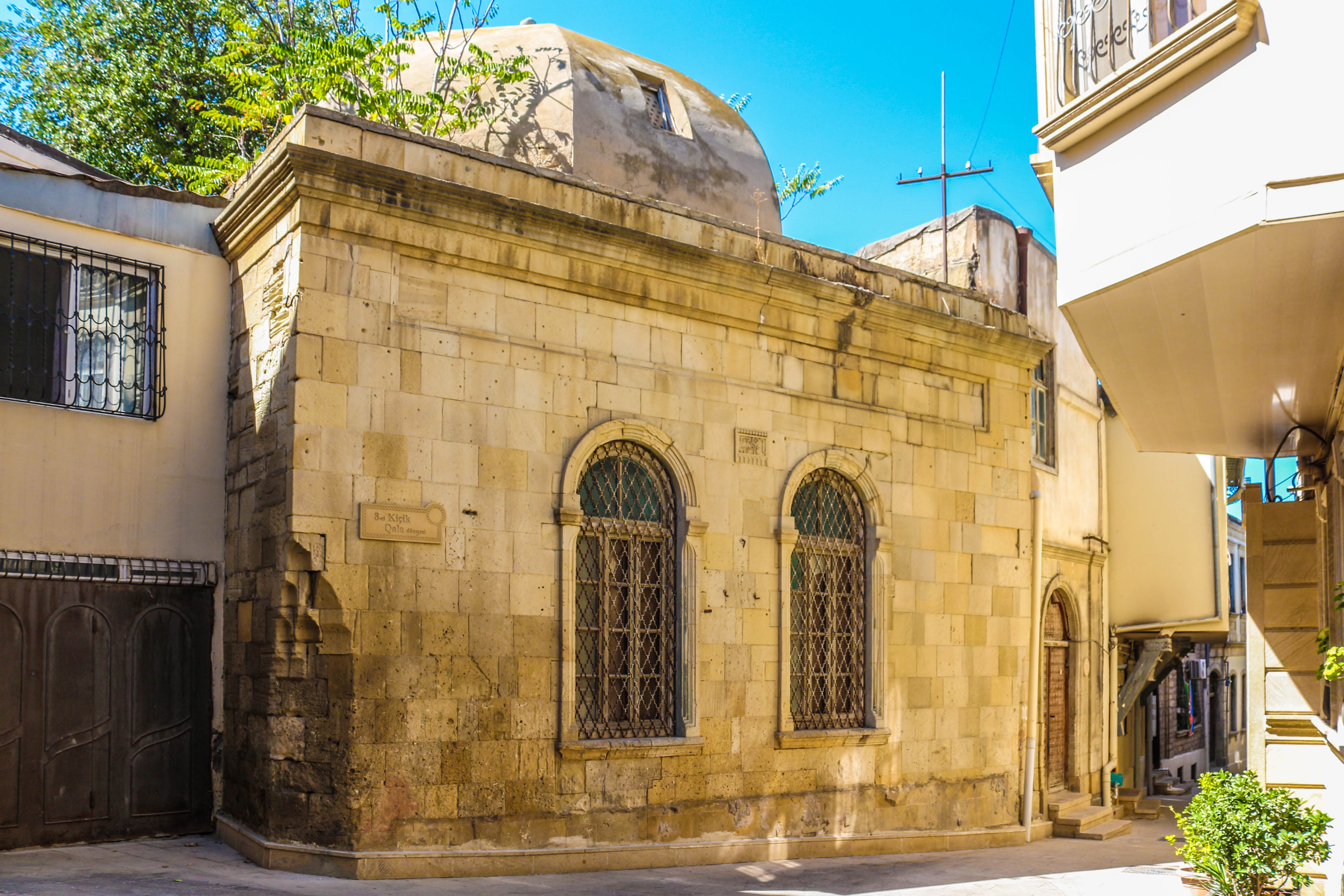 Hacı Bani məscidi